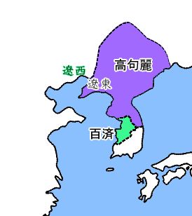 File:East Asia map blank.pngを元に、5世紀半ばの百済・高句麗と遼西地方の位置関係。吉川弘文館『世界史年表・地図』および『日本史年表・地図]を参考に作成